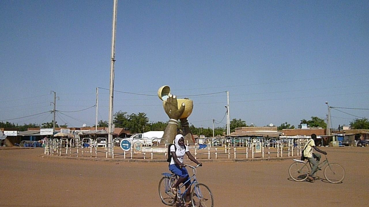 Kongoussi - Rond point This is an image with the theme "Africa on the Move or Transport" from: Burkina Faso